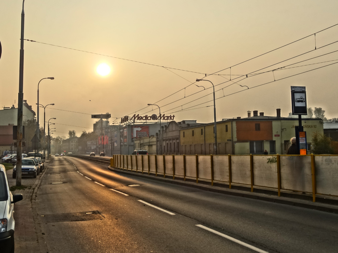 Ulica Jagiellońska w Bydgoszczy